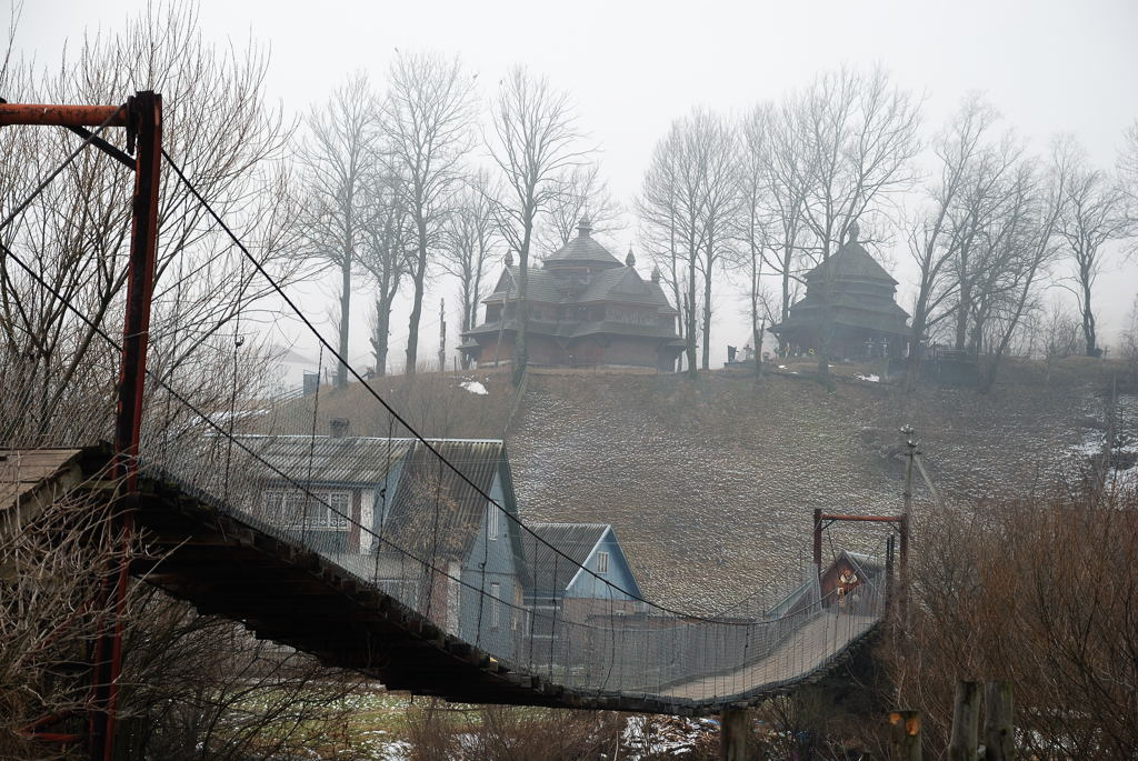 Вознесенська (Струків-ська) церква (дер.), смт.Ясіня